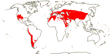 Imagem extraída de APG IV ( Distribuição de Ephedraceae.